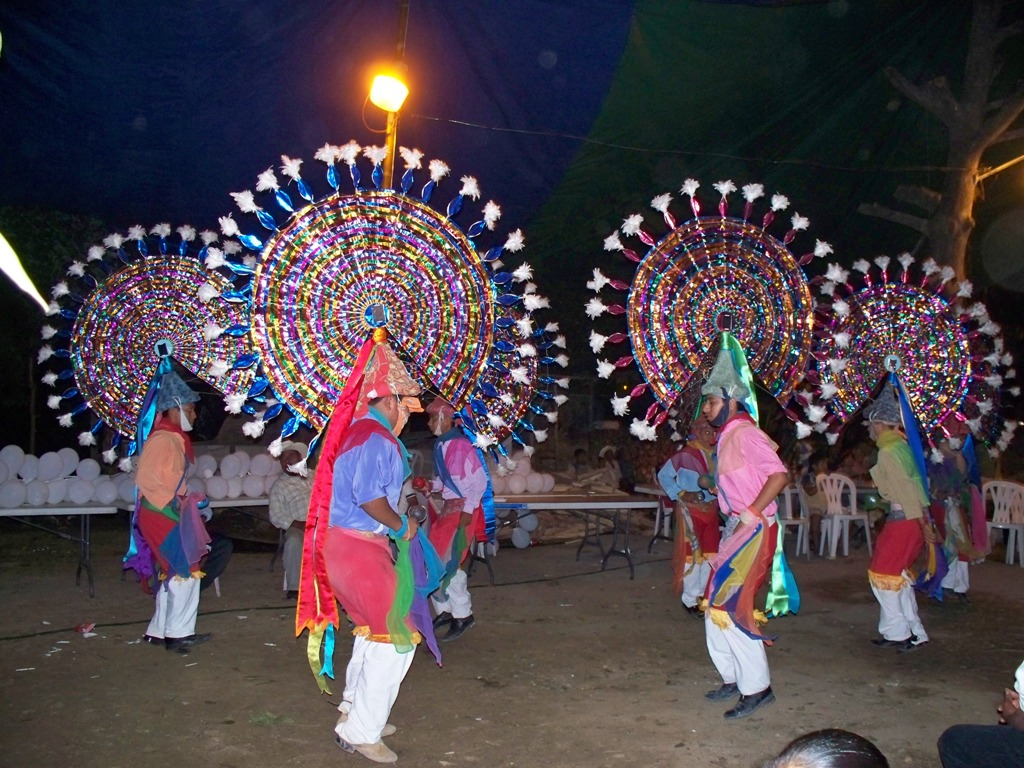 Danza indigena totonaca de los Lakas o Huahuas, en el municipio de Coyutla, Veracruz